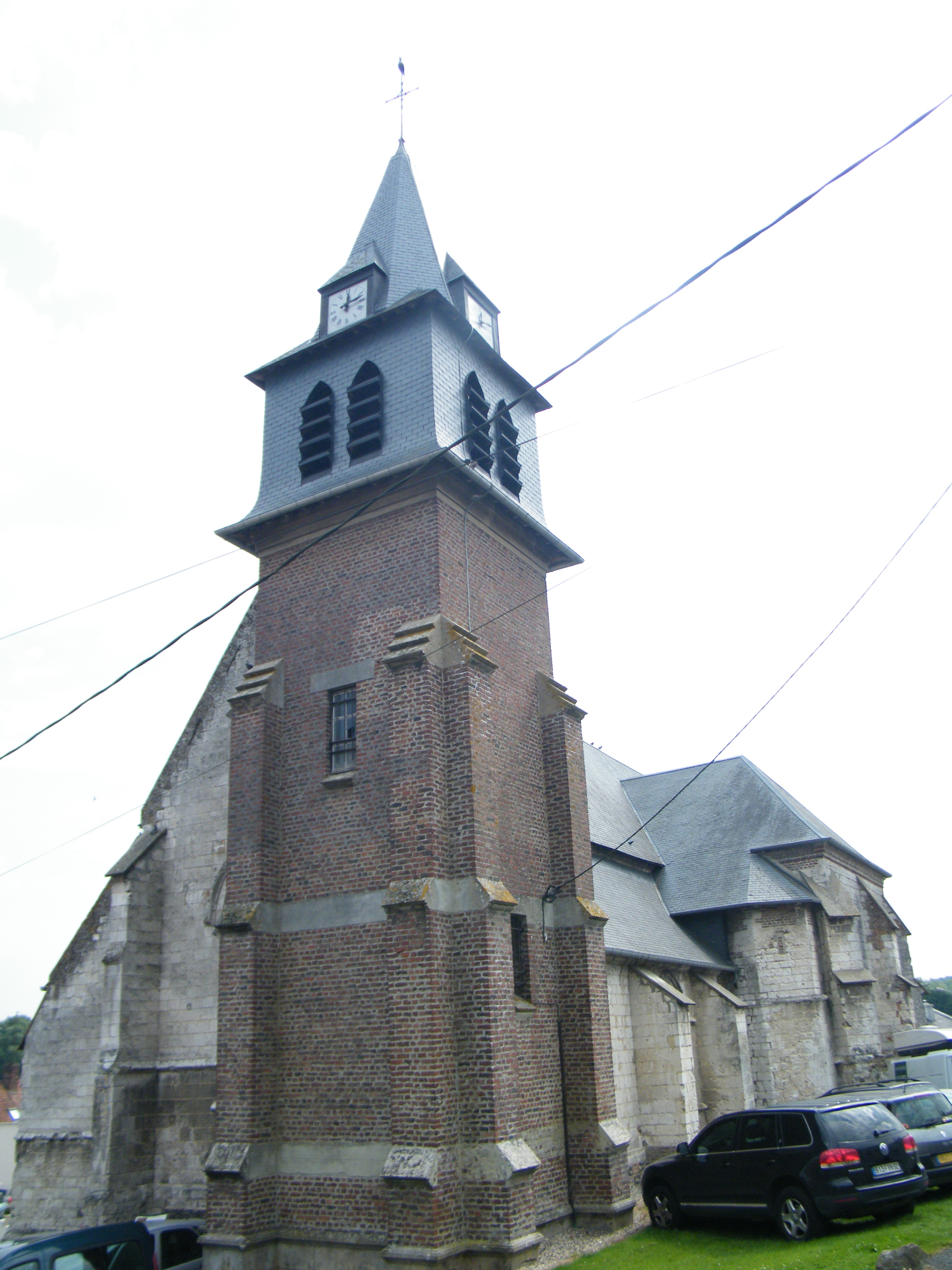 église